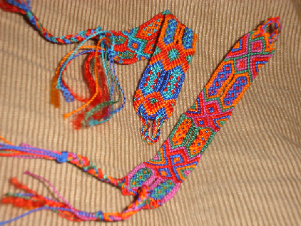 Bracelets. Friendship bracelets. Hand-woven bracelets. Artisan work.